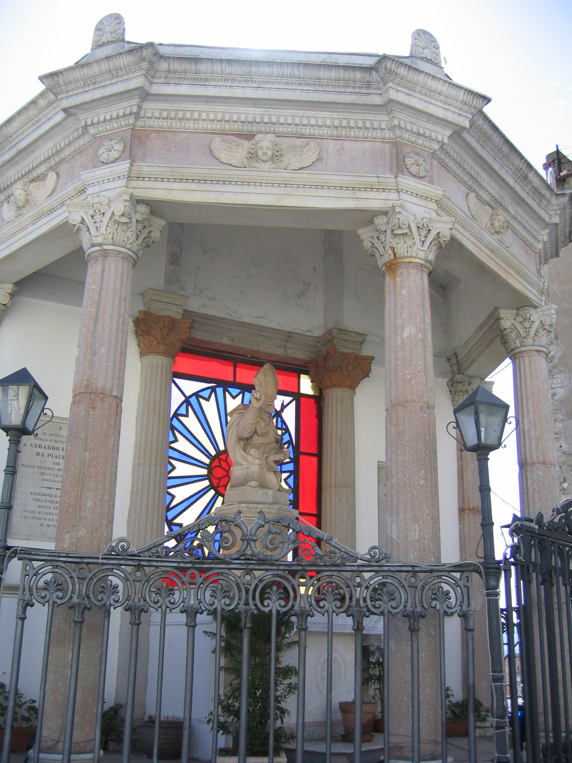 Altar en Potenza